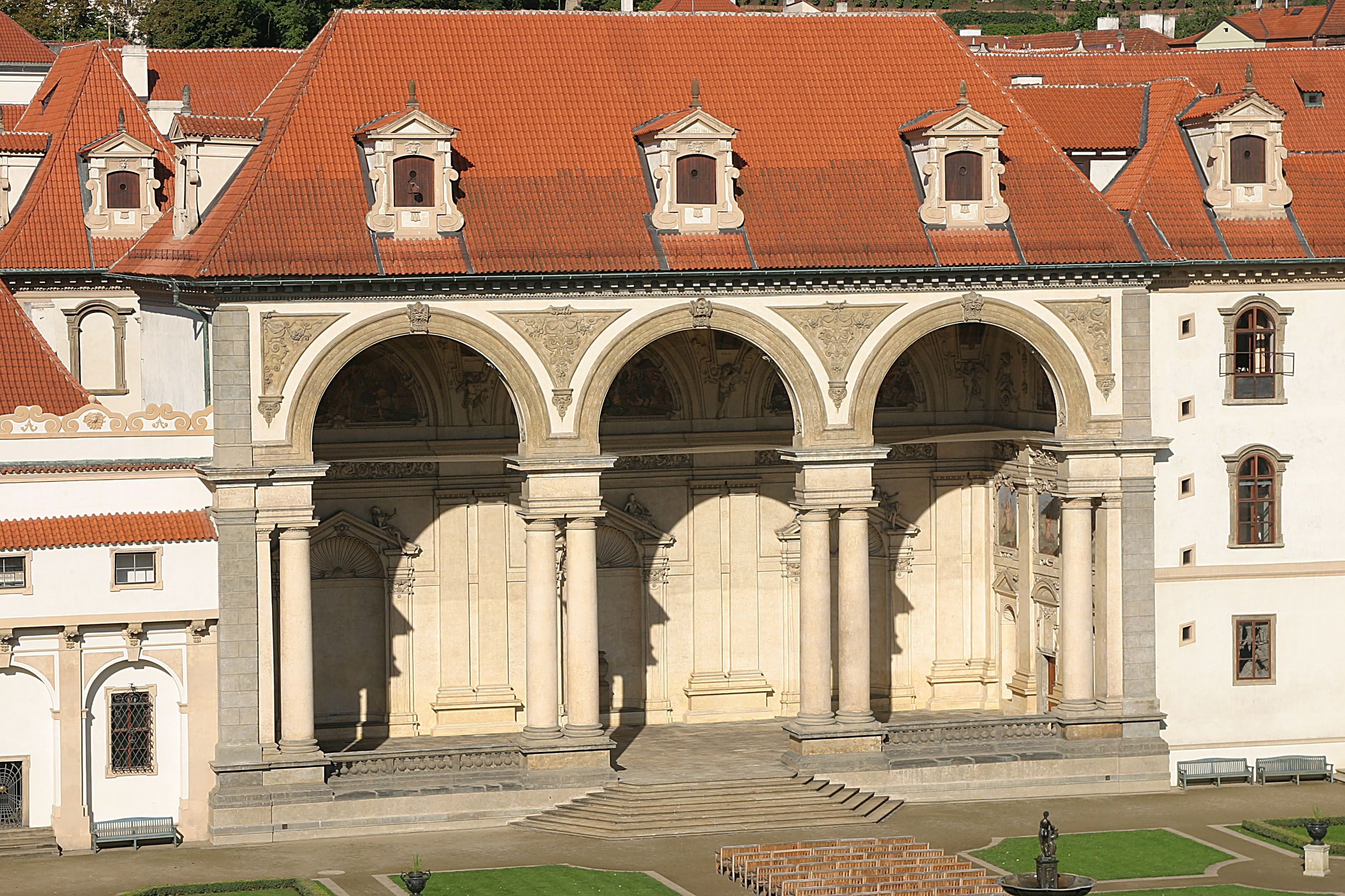 Salla terrena du palais Wallenstein